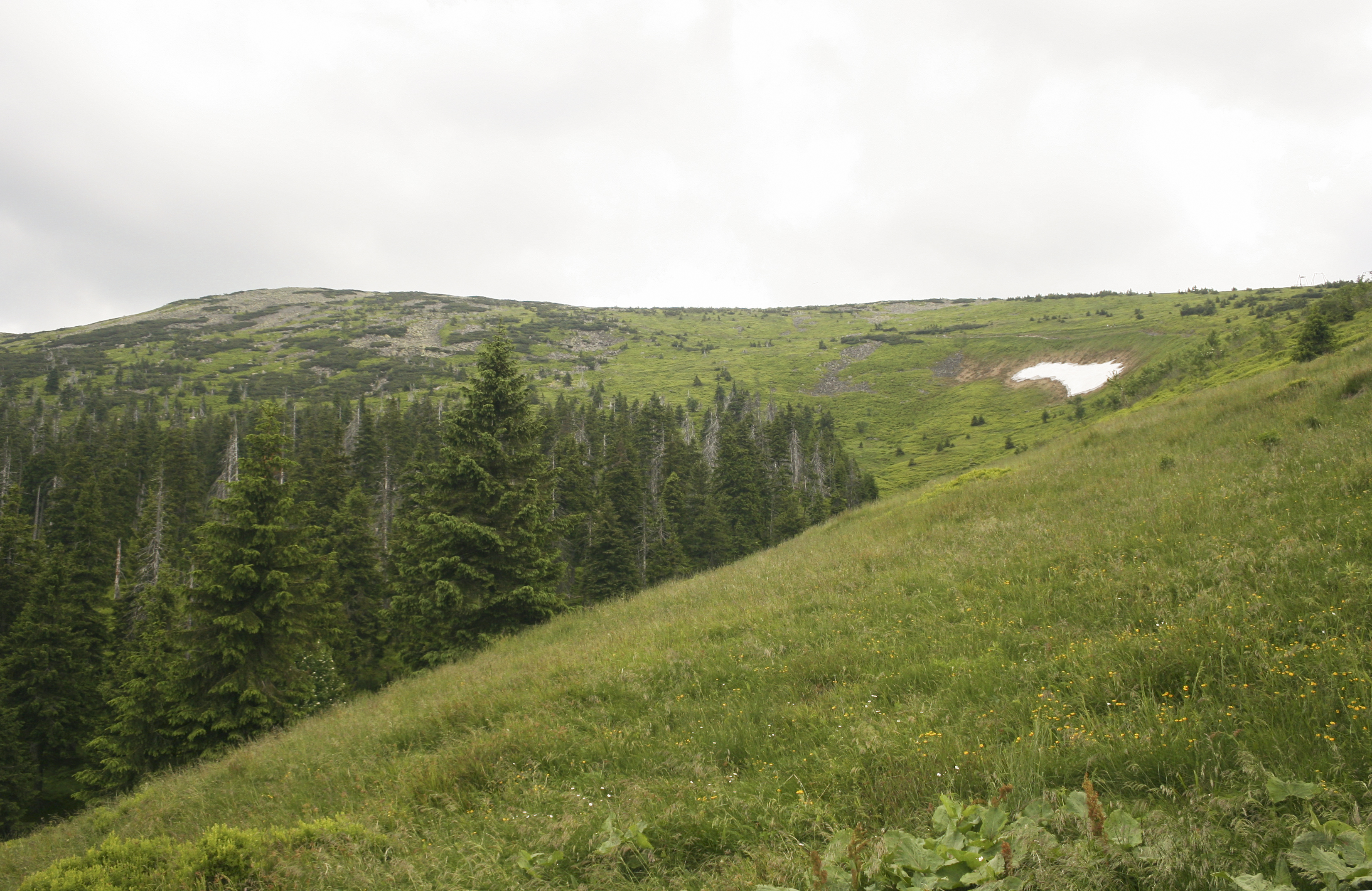 Łabski Kocioł (Łabski Cirque), Karkonosze Mountains, Poland.